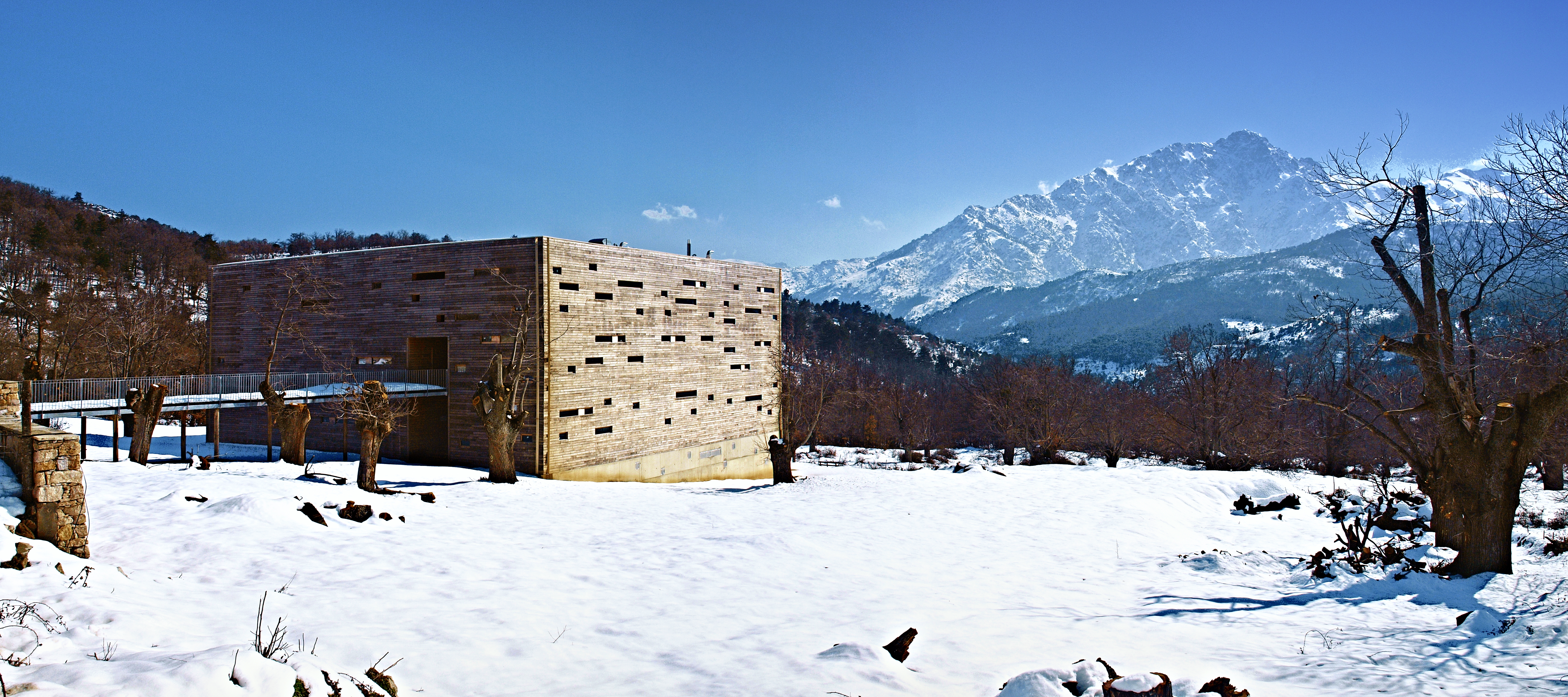 Pioggiola (Corsica) - L'outil théâtral A Stazzona (La Forge)